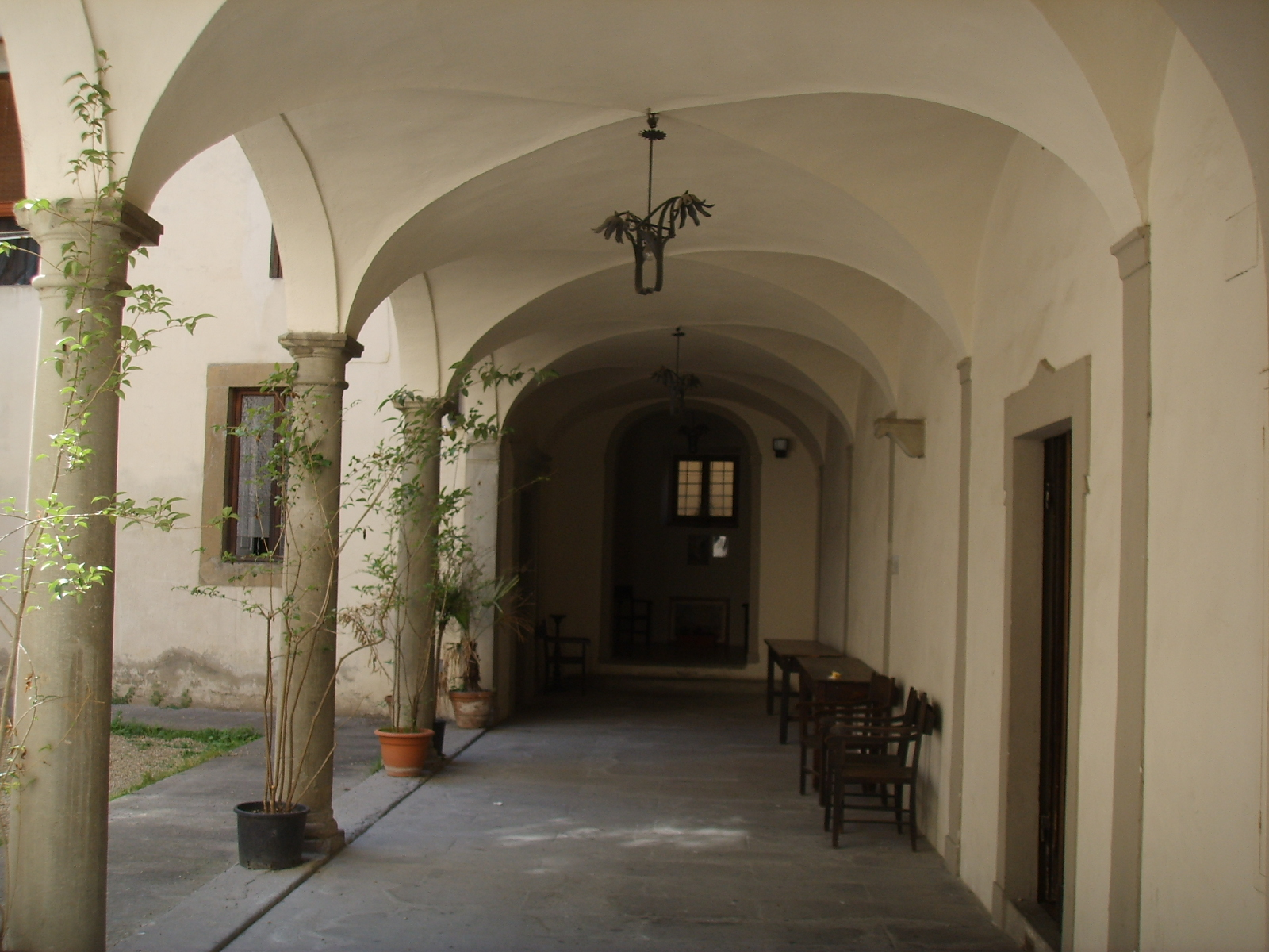 San jacopo tra i fossi, chiostro